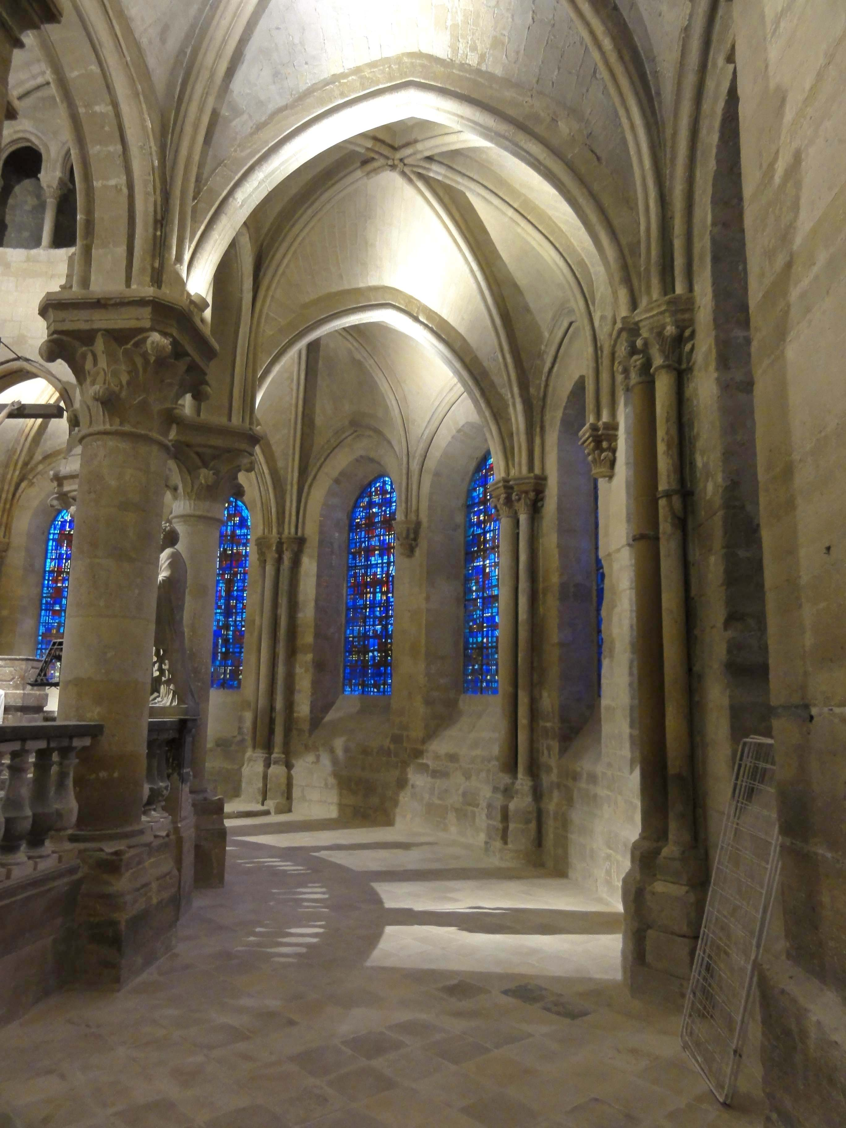 Intérieur de l'église - voir titre.